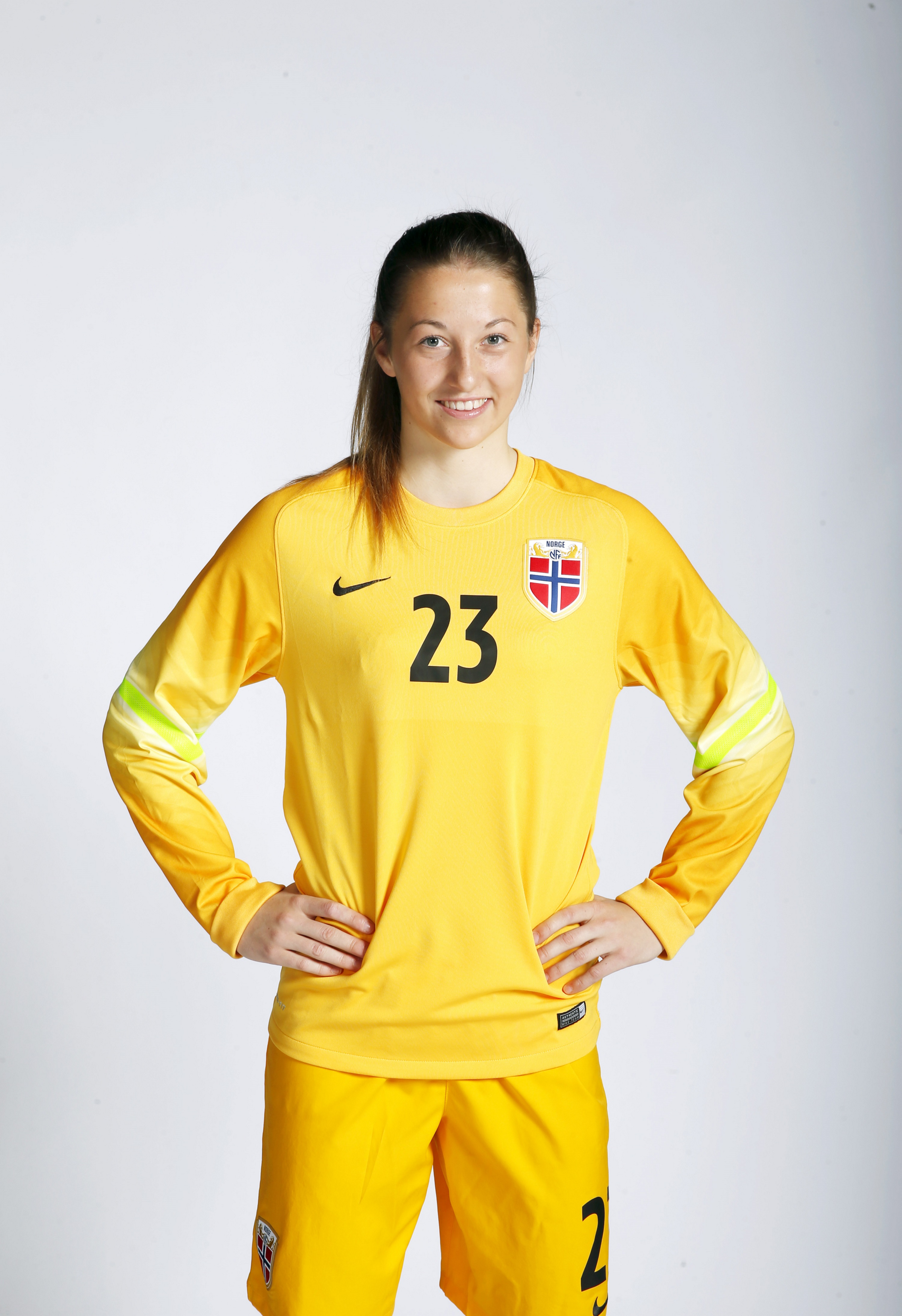 Cecilie Fiskerstrand, målvakt